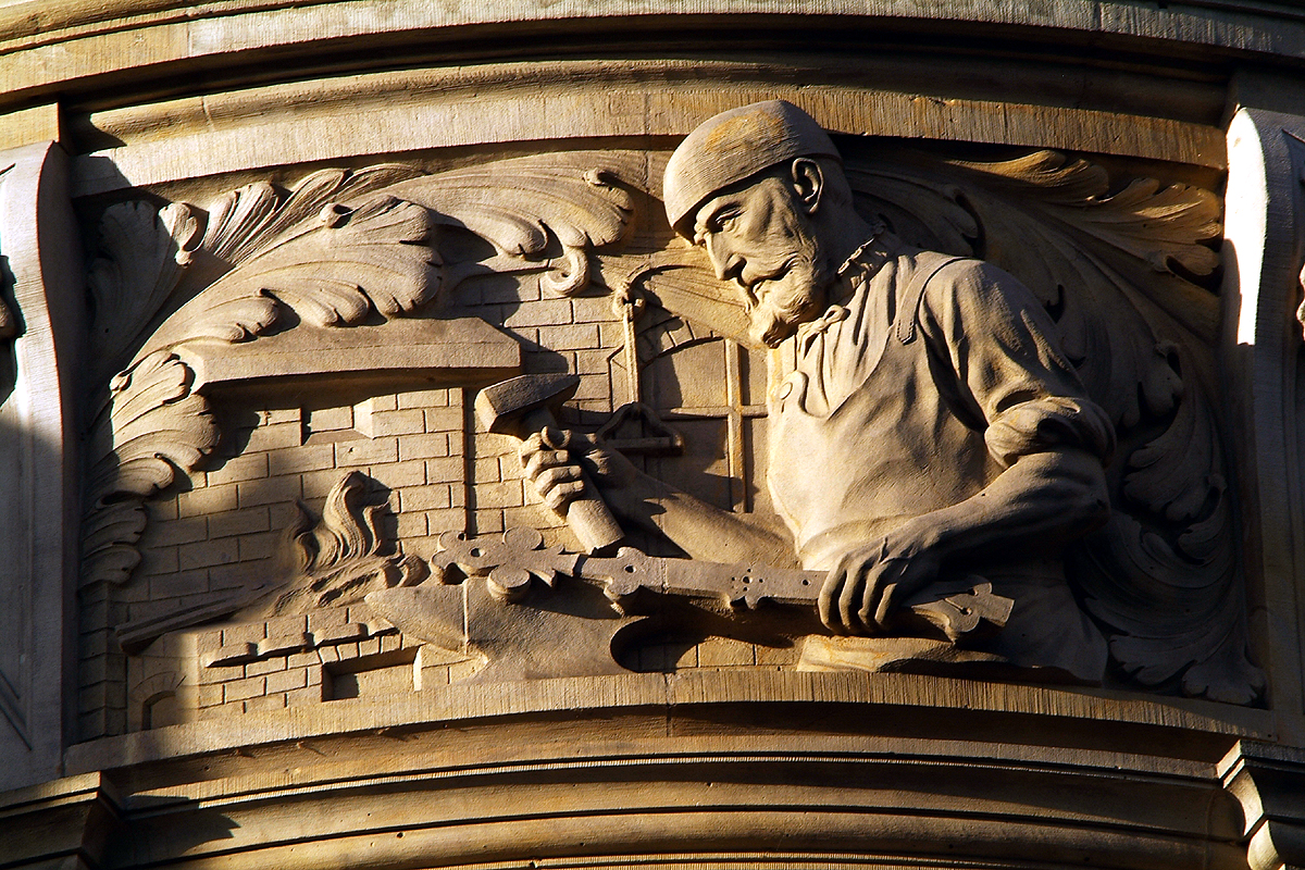 Der Beruf des Schmiedes ist eines der ältesten Handwerke, die Schmiedestraße eine der ältesten Straßen der Stadt Hannover. Einer der bekanntesten Schmiede der Stadt war der Bildhauer Ernst Bandel, der im 19. Jahrhundert das Hermannsdenkmal schuf. Das Relief ist Teil des halbplastischen Geschichts- oder auch "Bilderfrieses" am Neuen Rathaus in Hannover, der Bildhauer ist noch unidentifiziert ...